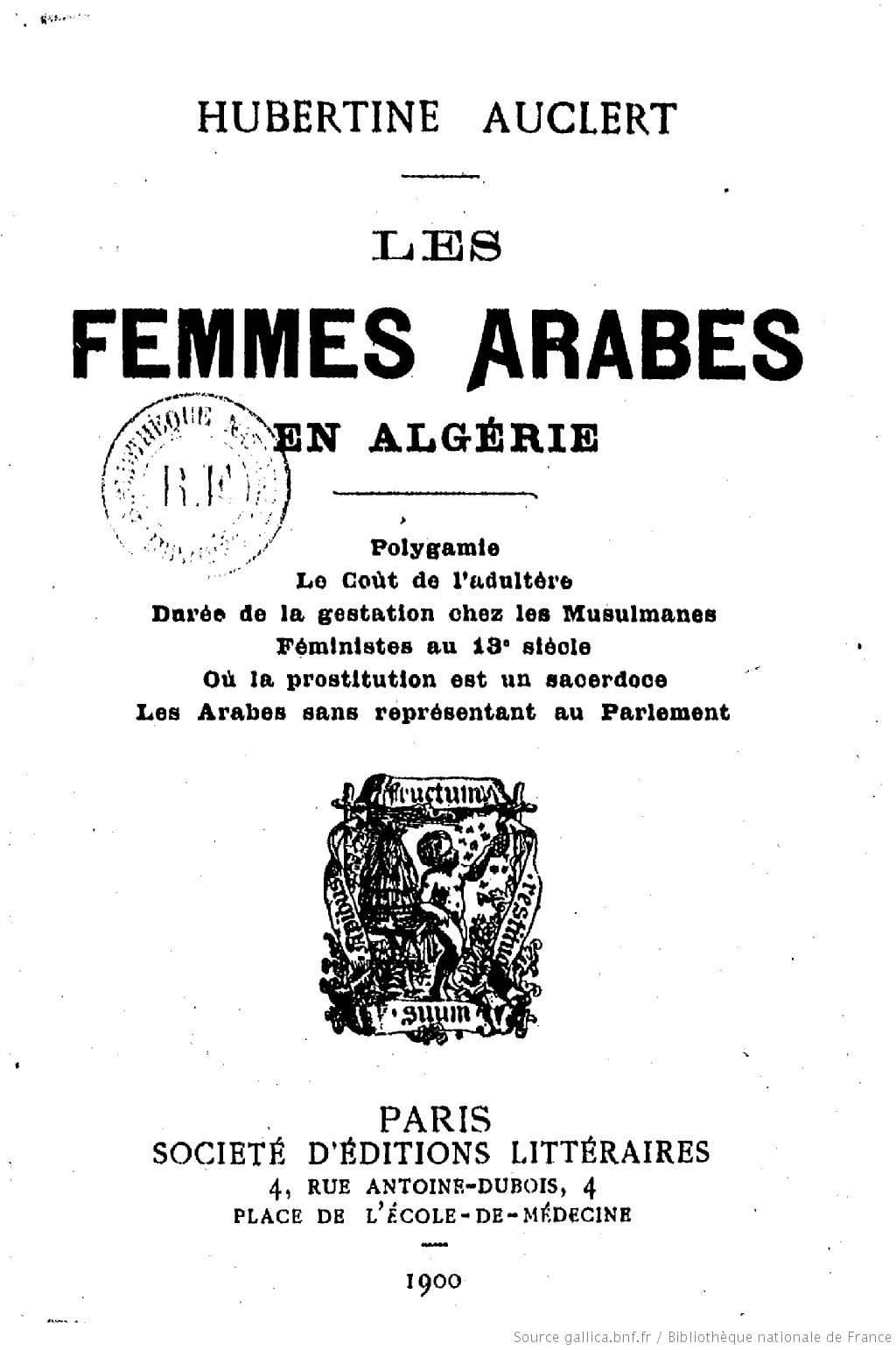 Couverture du livre d'Hubertine Auclert : les femmes arabes en Algérie (1900)